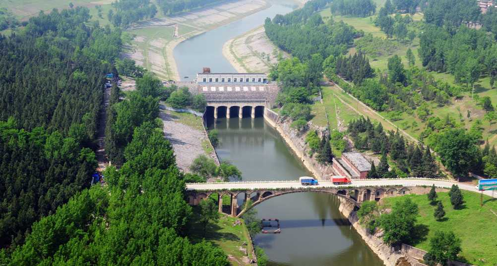 henanfengjing